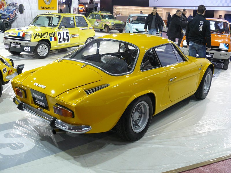 Retromobile 2012